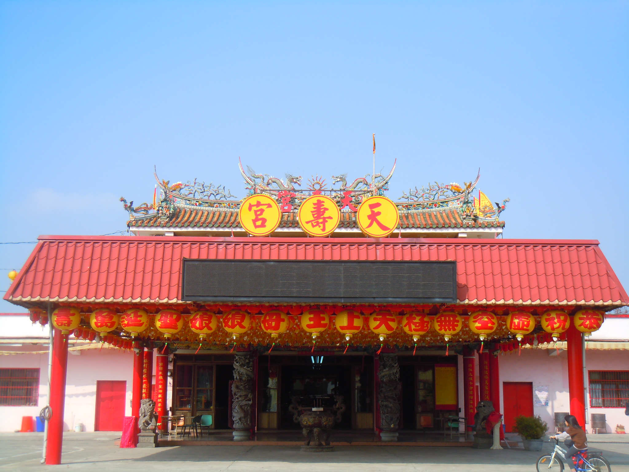 中文（台灣）: 上楓天壽宮的所在地:臺中市大雅區上楓里民生路三段415巷。